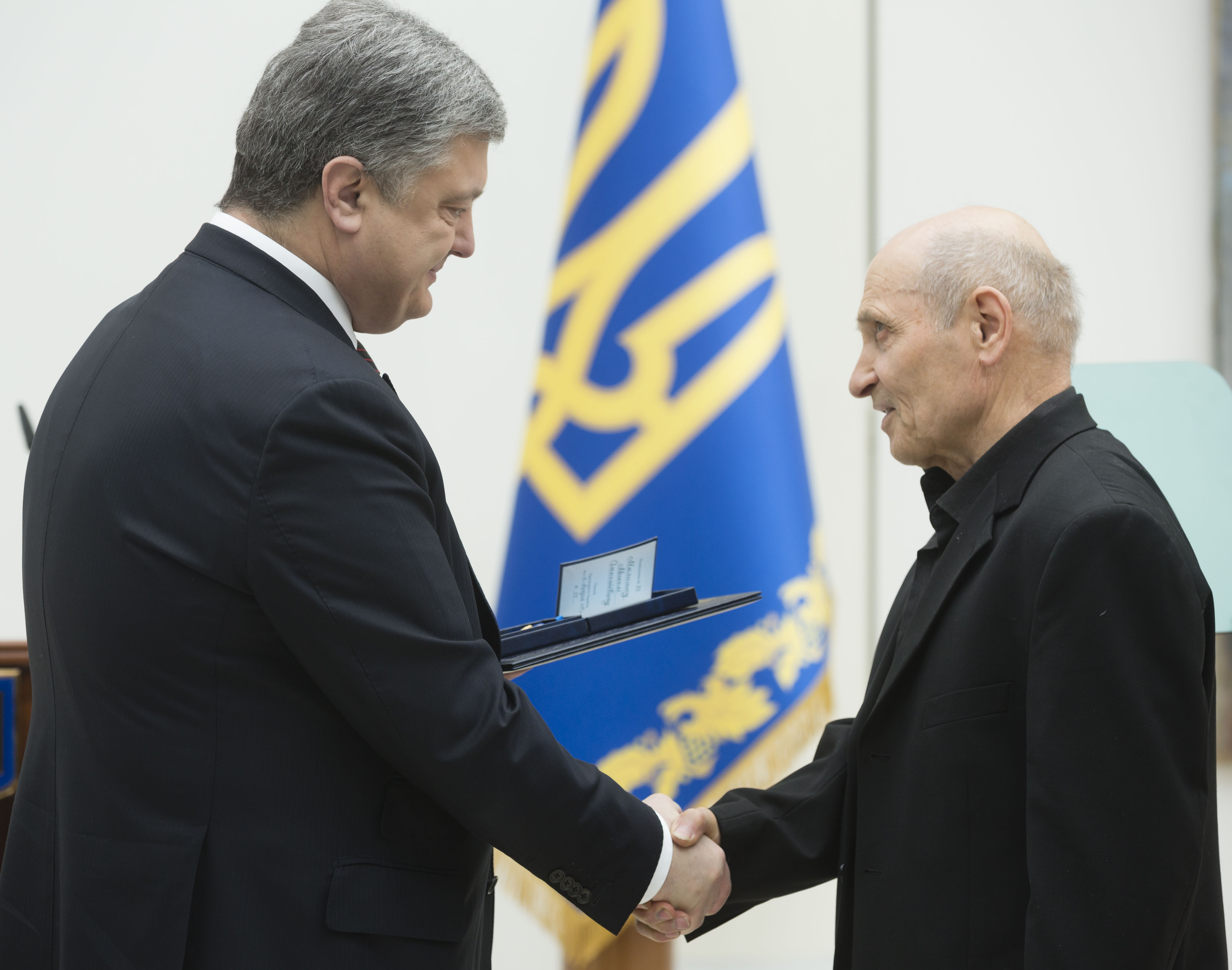 Микола Малишко на церемонії вручення Національної премії України імені Тараса Шевченка 2017 року.